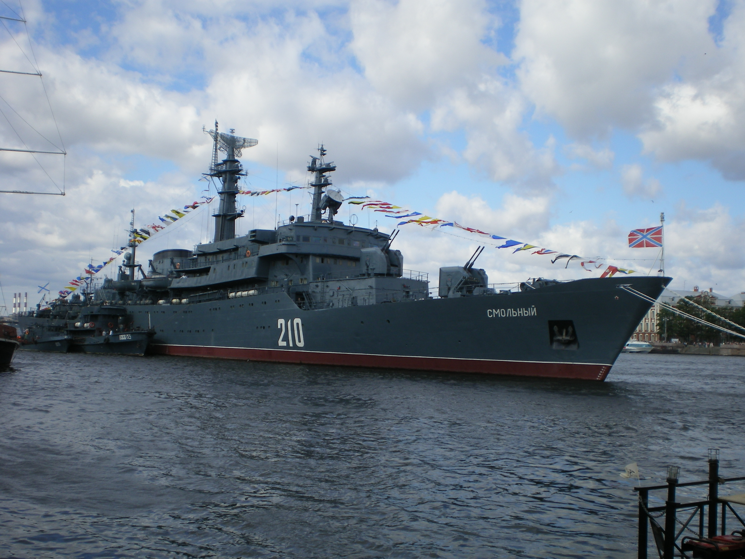 Учебный корабль проекта 887 «Смольный» в Санкт-Петербурге на праздновании дня ВМФ в 2008 году